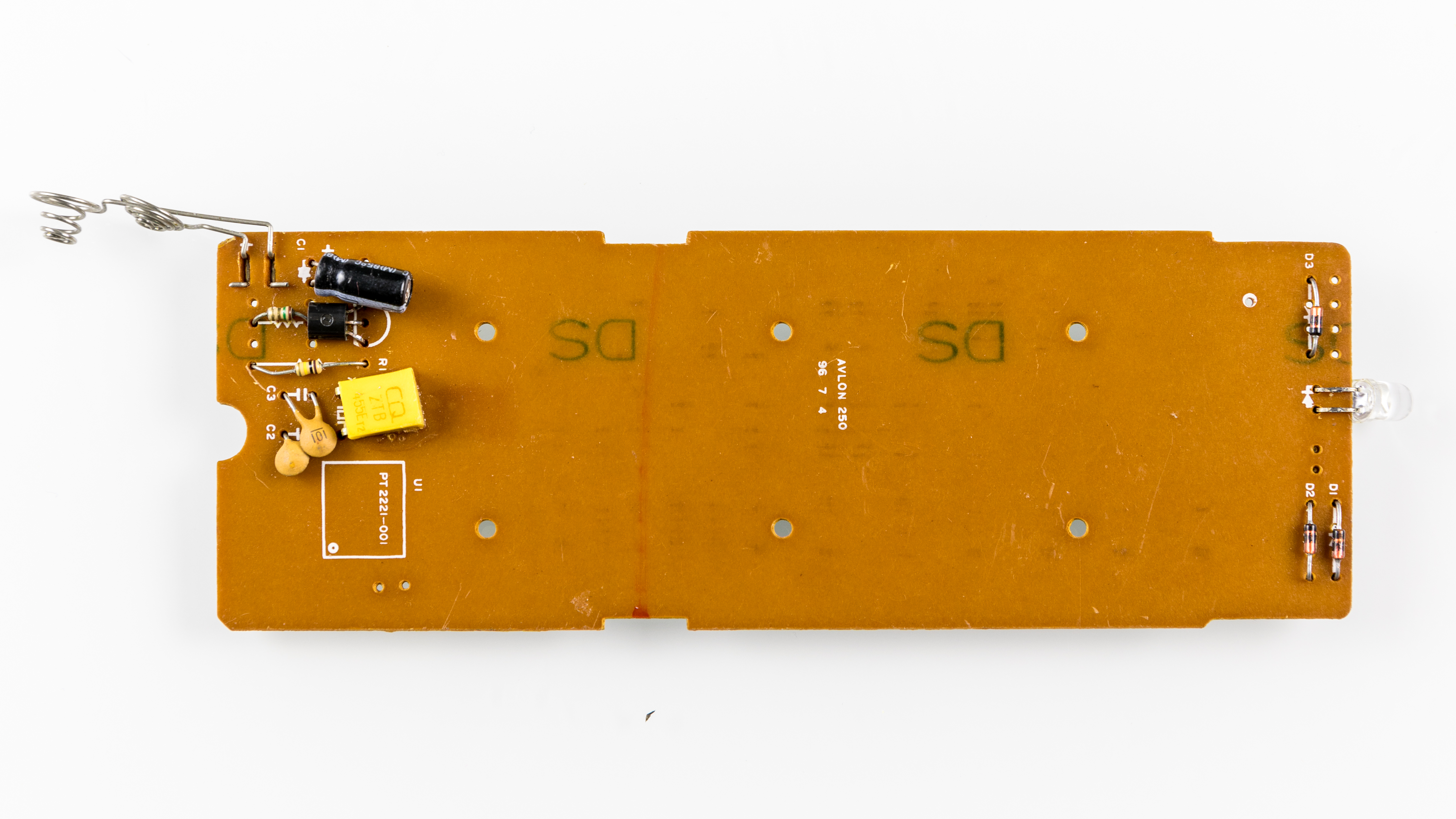 Television remote control - unbranded - PCB rear side